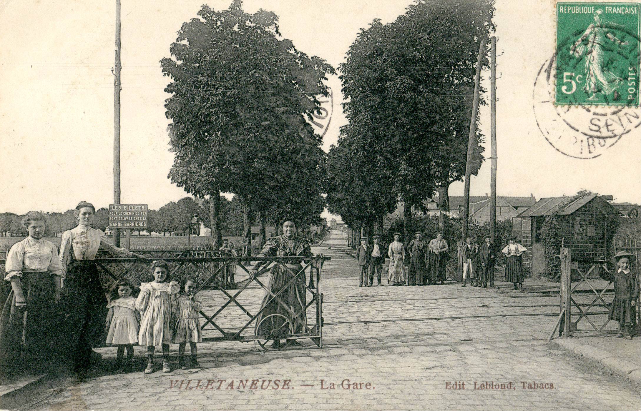 Carte postale ancienne éditée par Leblond VILLETANEUSE- La Gare (ligne de Grande Ceinture) (La halte était constituée par la maison de garde barrières)